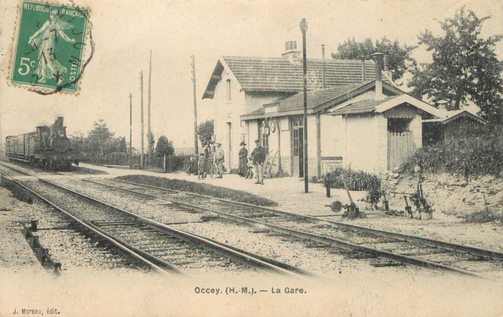 La gare vers 1913